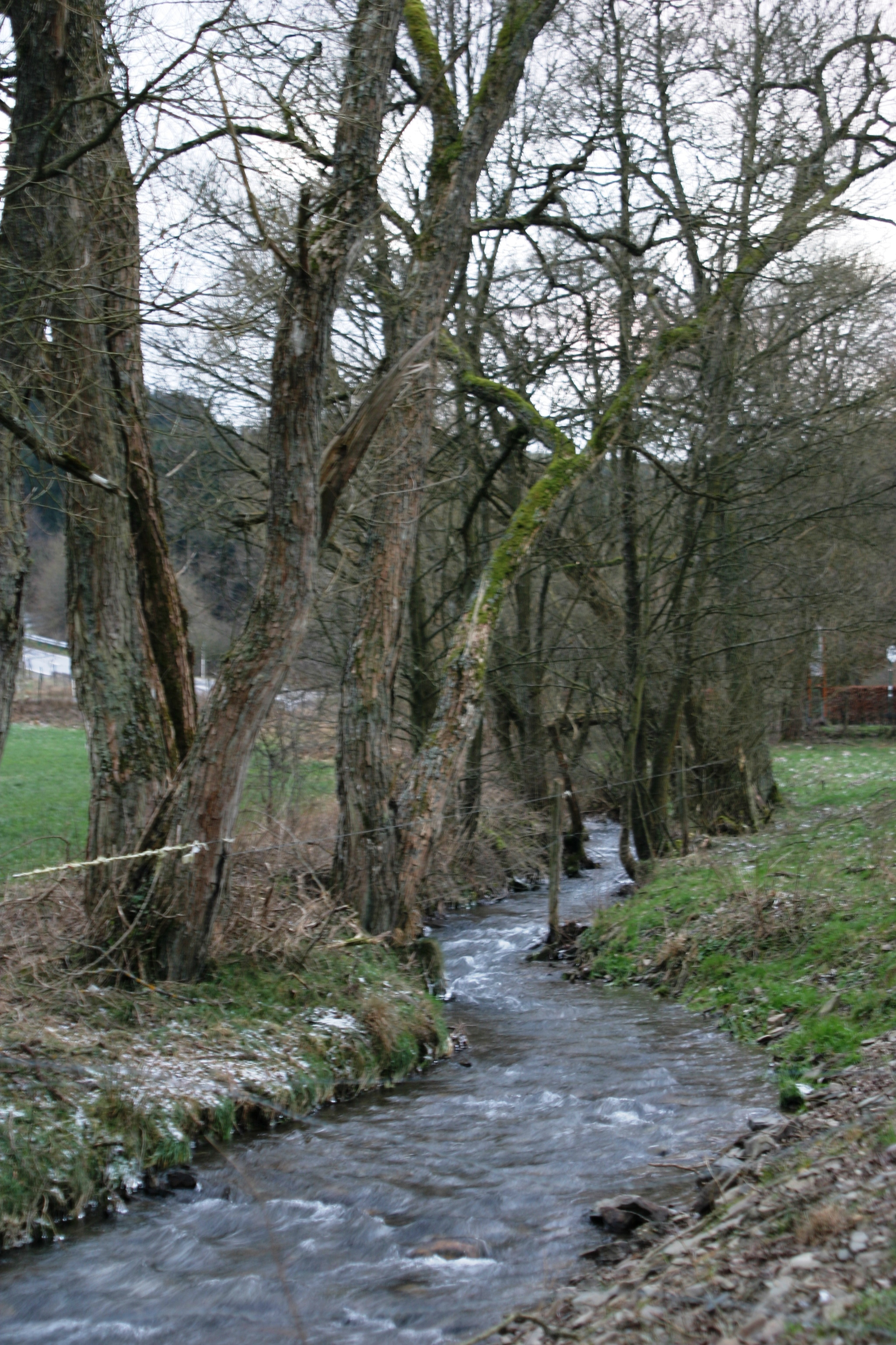 D'Réibach op der Belsch-Lëtzebuergescher Grenz 100 Meter virun der Mëndung an d'Our.